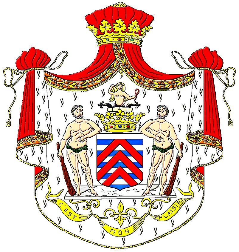 Wappen des Herzogs (Duc) de La Rochefoucauld